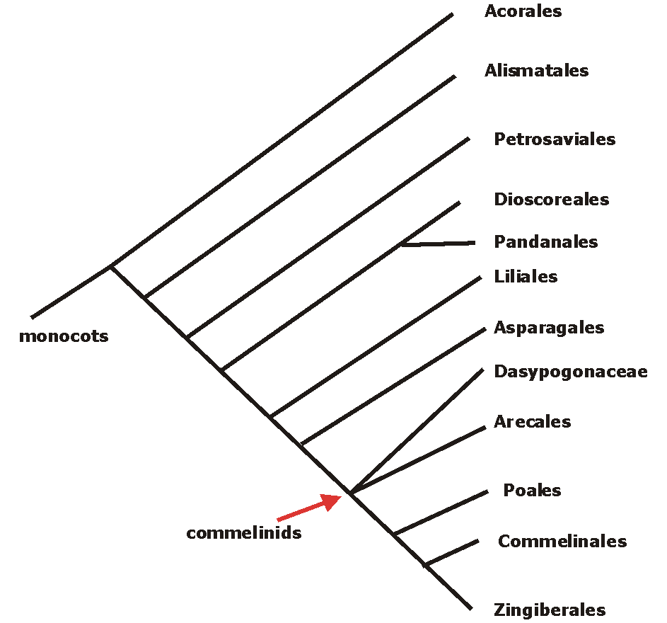 Tự vẽ lại theo APG. Sử dụng tự do.